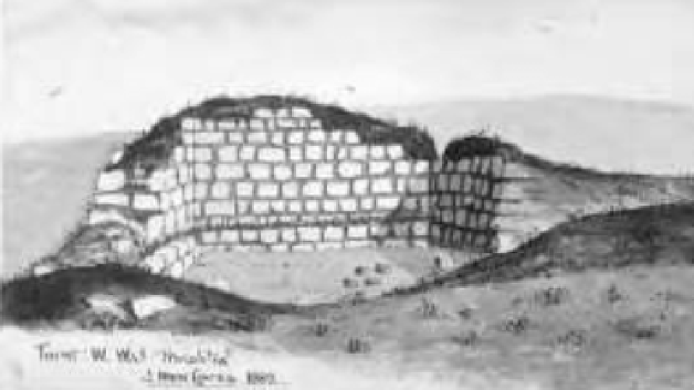 Überreste eines Zwischenturms an der Westmauer (südlich des Westtores) des römischen Kastell Carrawburgh/Brocolitia, Zeichnung von 1882.